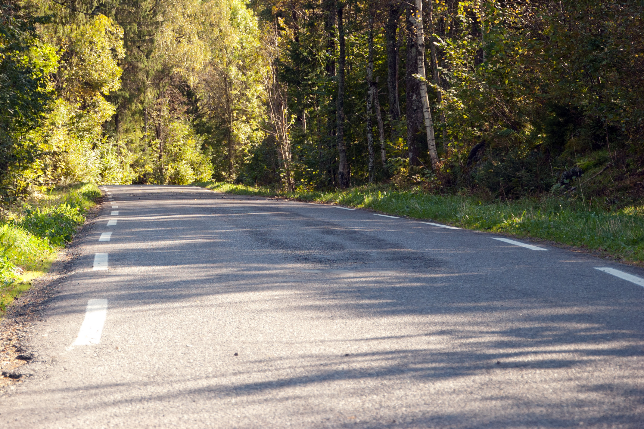 Fylkesvei 755 Bjuneveien ved Kåpe i Re, Vestfold